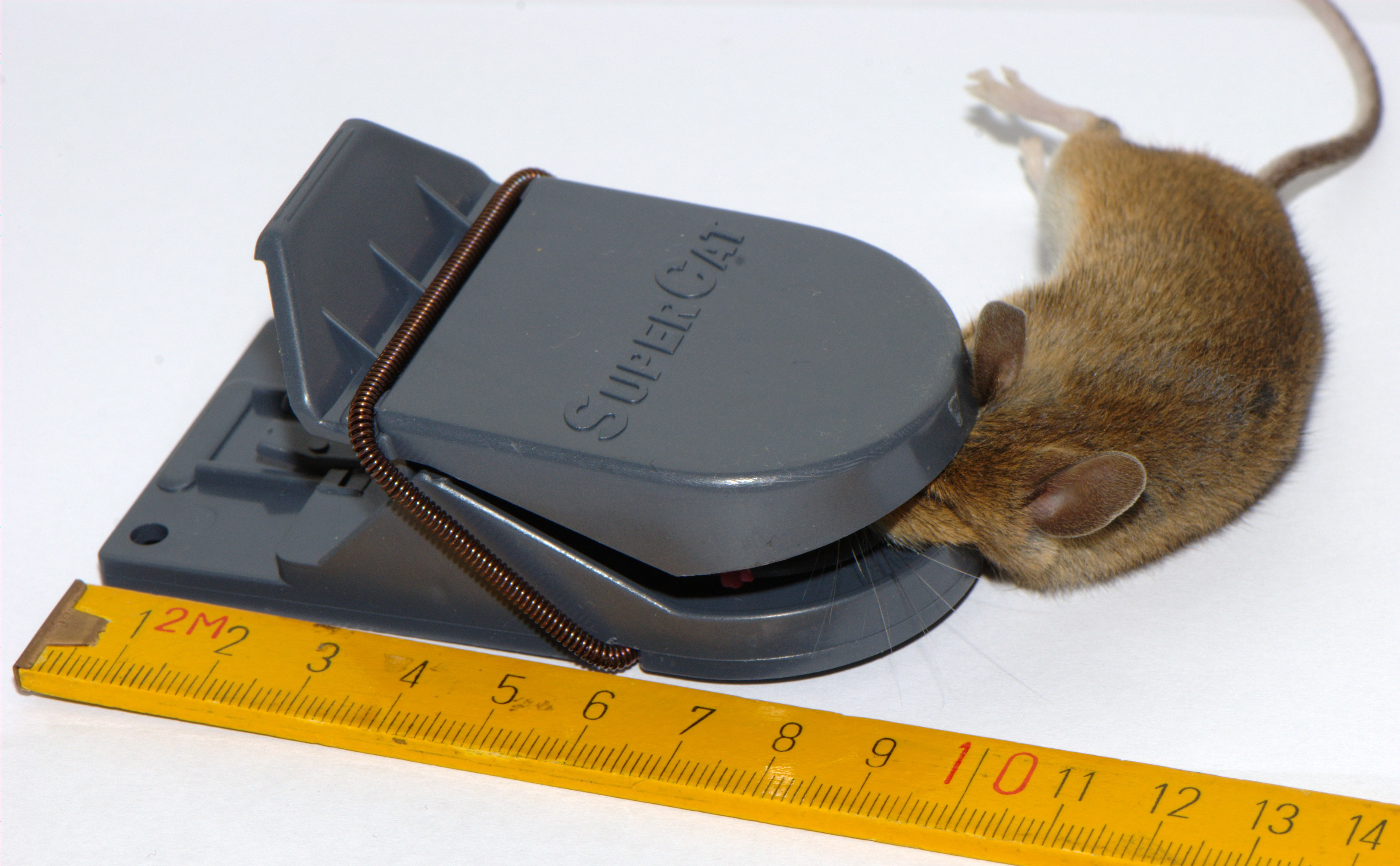 Schlagfalle aus Kunststoff mit Hausmaus